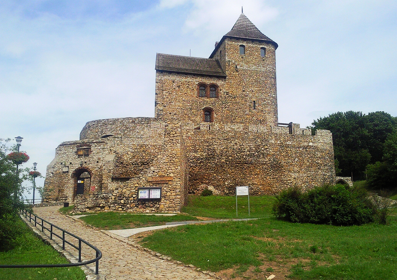 Zamek w Będzinie (widok od strony ulicy Piłsudskiego)